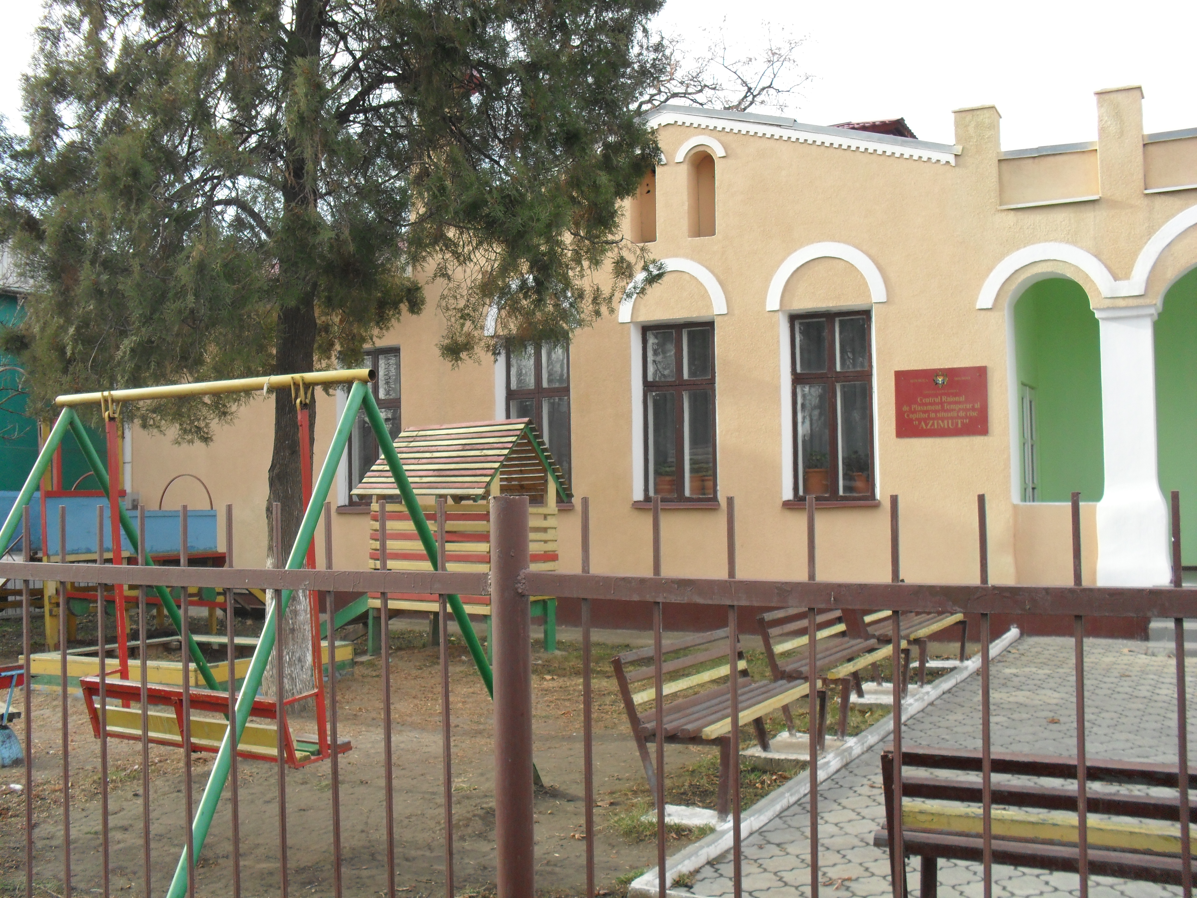 м. Сороки. "Azimut"